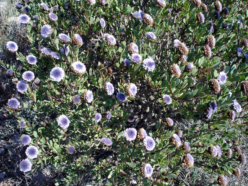 Globularia alypum (globulaire buissonnante) Photo prise à Castelnou en avril 2005 Jean Tosti 2005